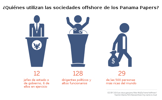 Infografía publicada en el sitio web del periódico Le Monde mostrando aspectos de la composición de las personas involucradas en las revelaciones de la filtración de documentos « Panama Papers » (Rótulos traducidos al español)